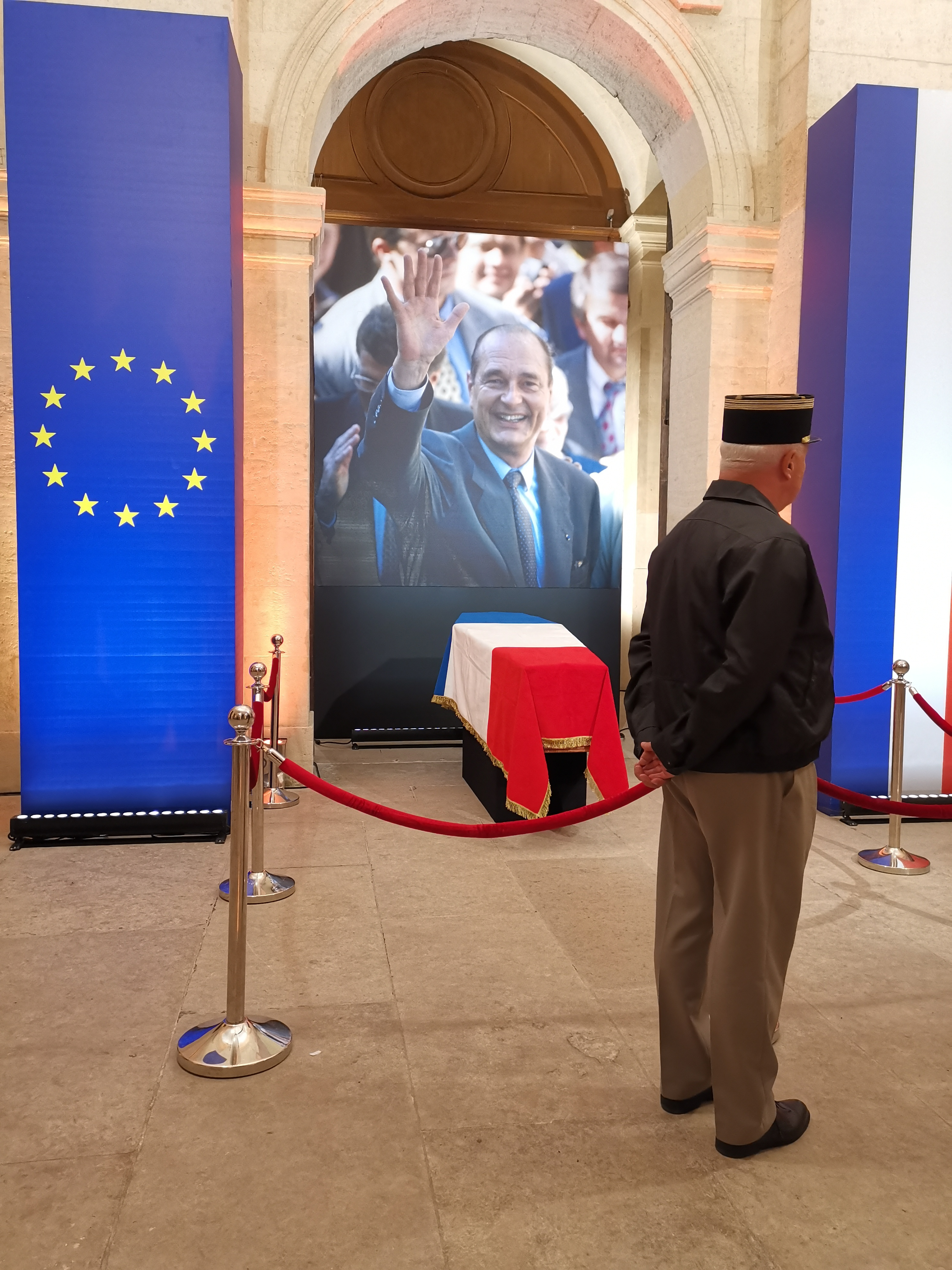 Hôtel des Invalides, Obsèques de Jacques Chirac